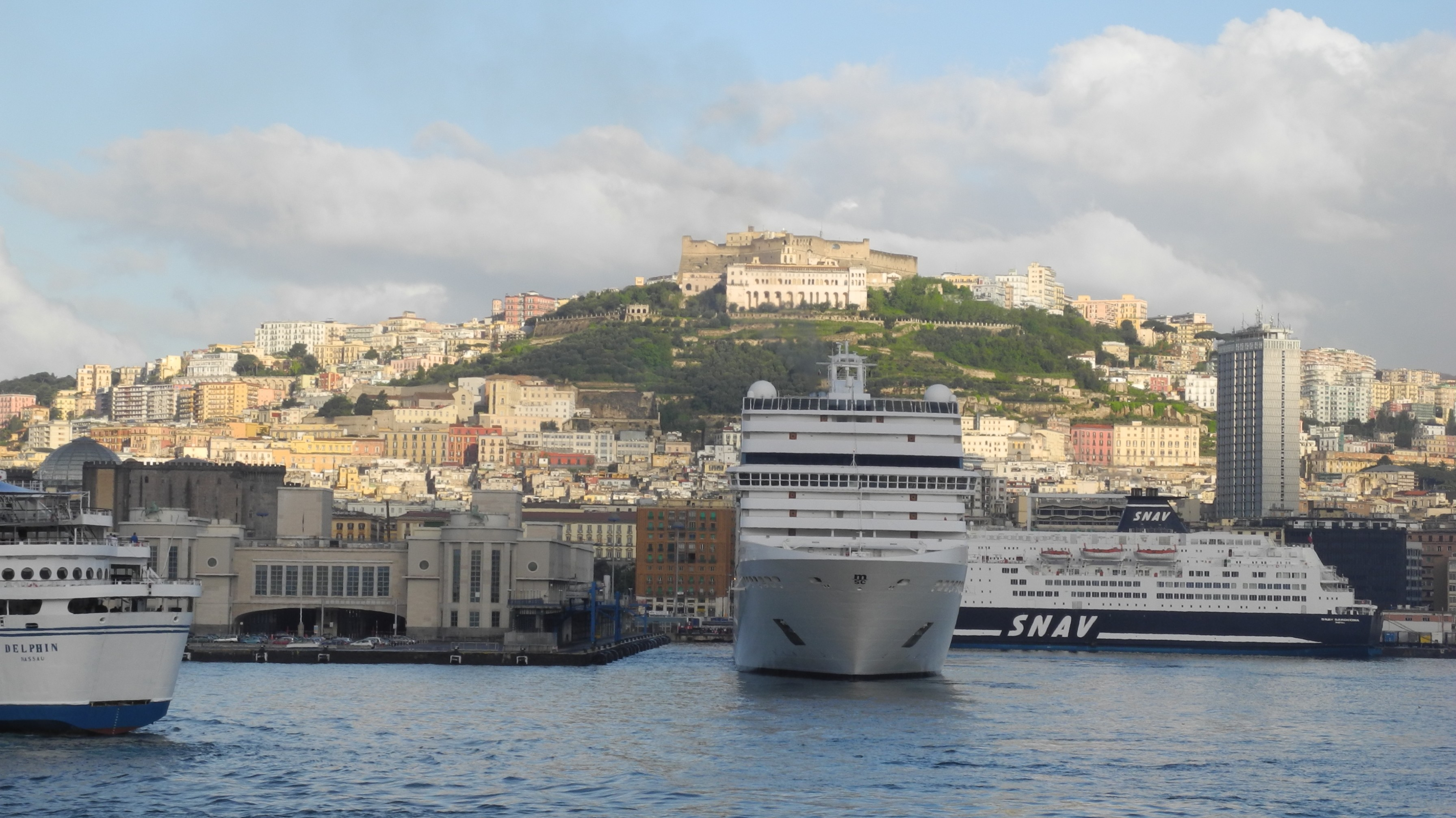 Napoli-Fährhafen, Kreuzfahrtschiff